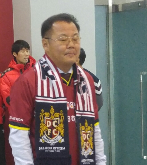 대전시티즌 ɨ0대 감독 이영익 감독